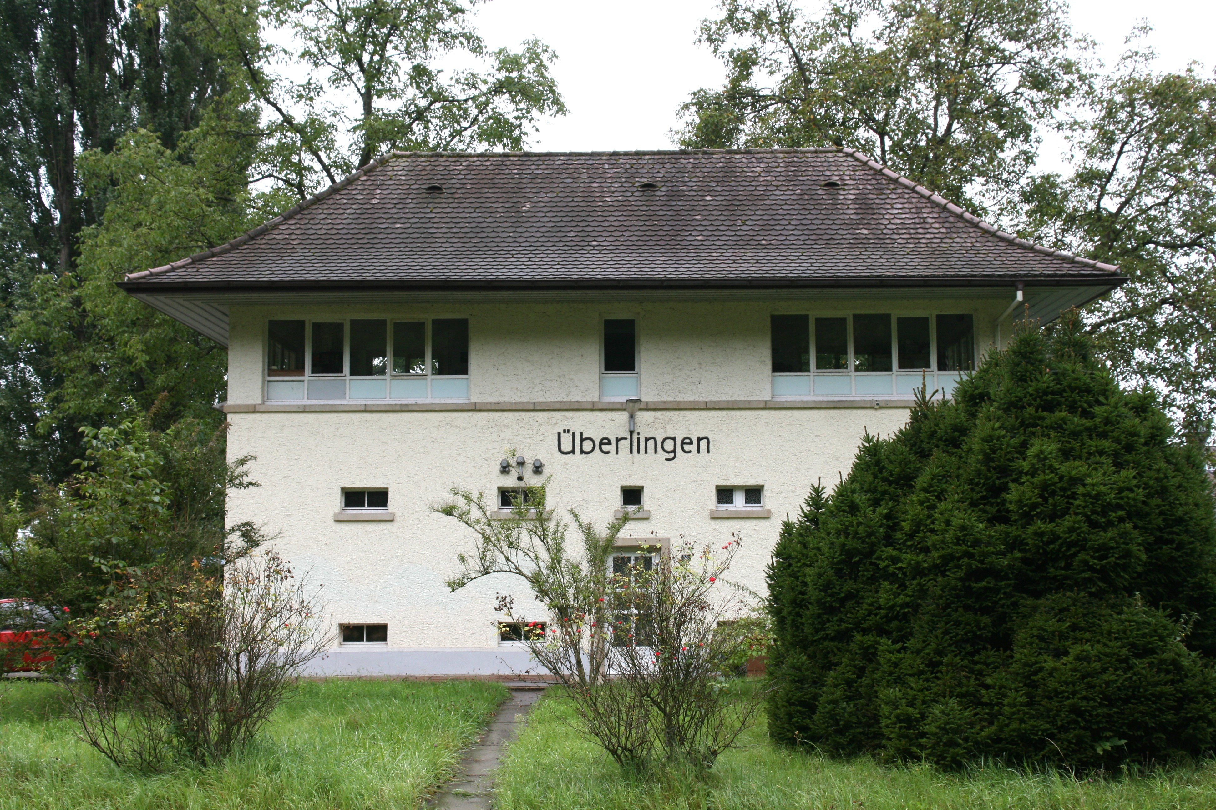 Bahnhofstraße in Überlingen